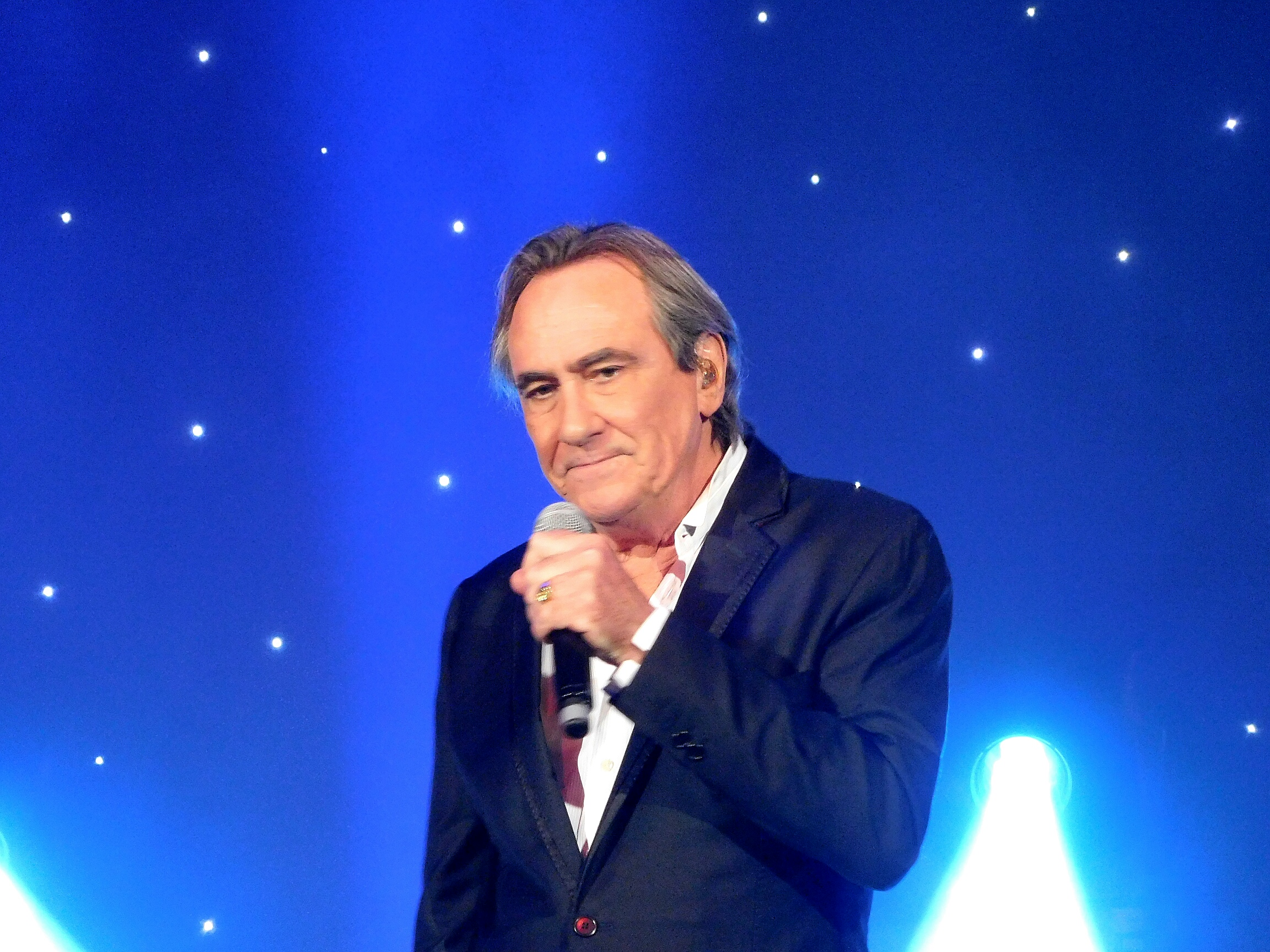 Philippe Lavil sur la croisière Age Tendre 2017